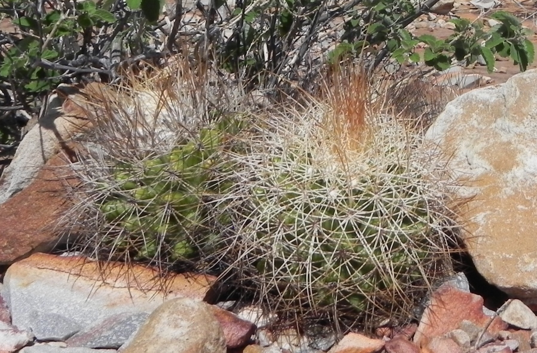 Bahia Brasil